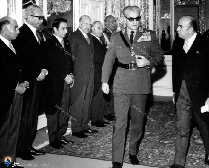 محمدرضا پهلوی و امیرعباس هویدا